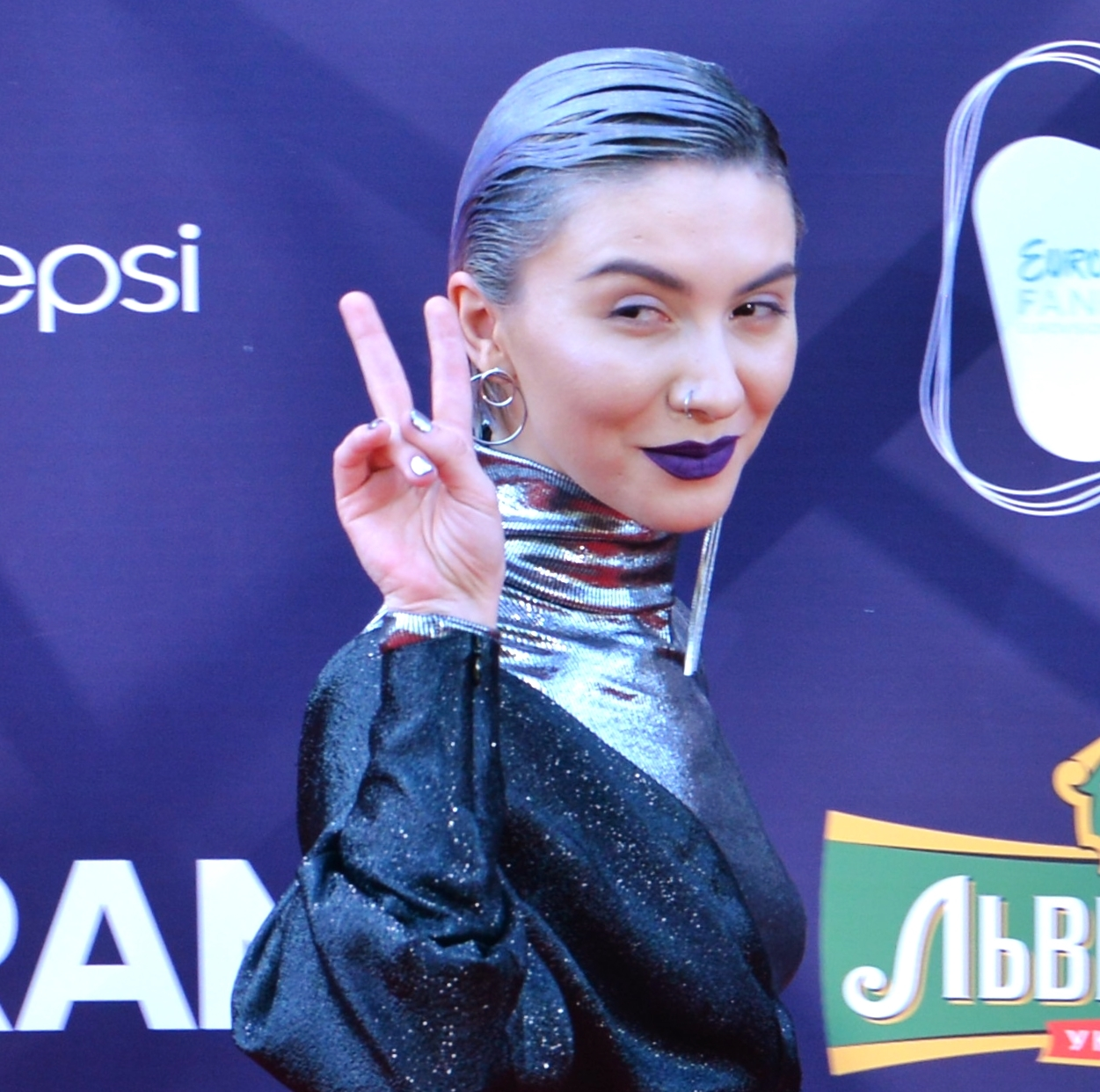 Азербайджанська співачка Діана Гаджієва (Dihaj) на церемонії відкриття Євробачення 2017 у Києві